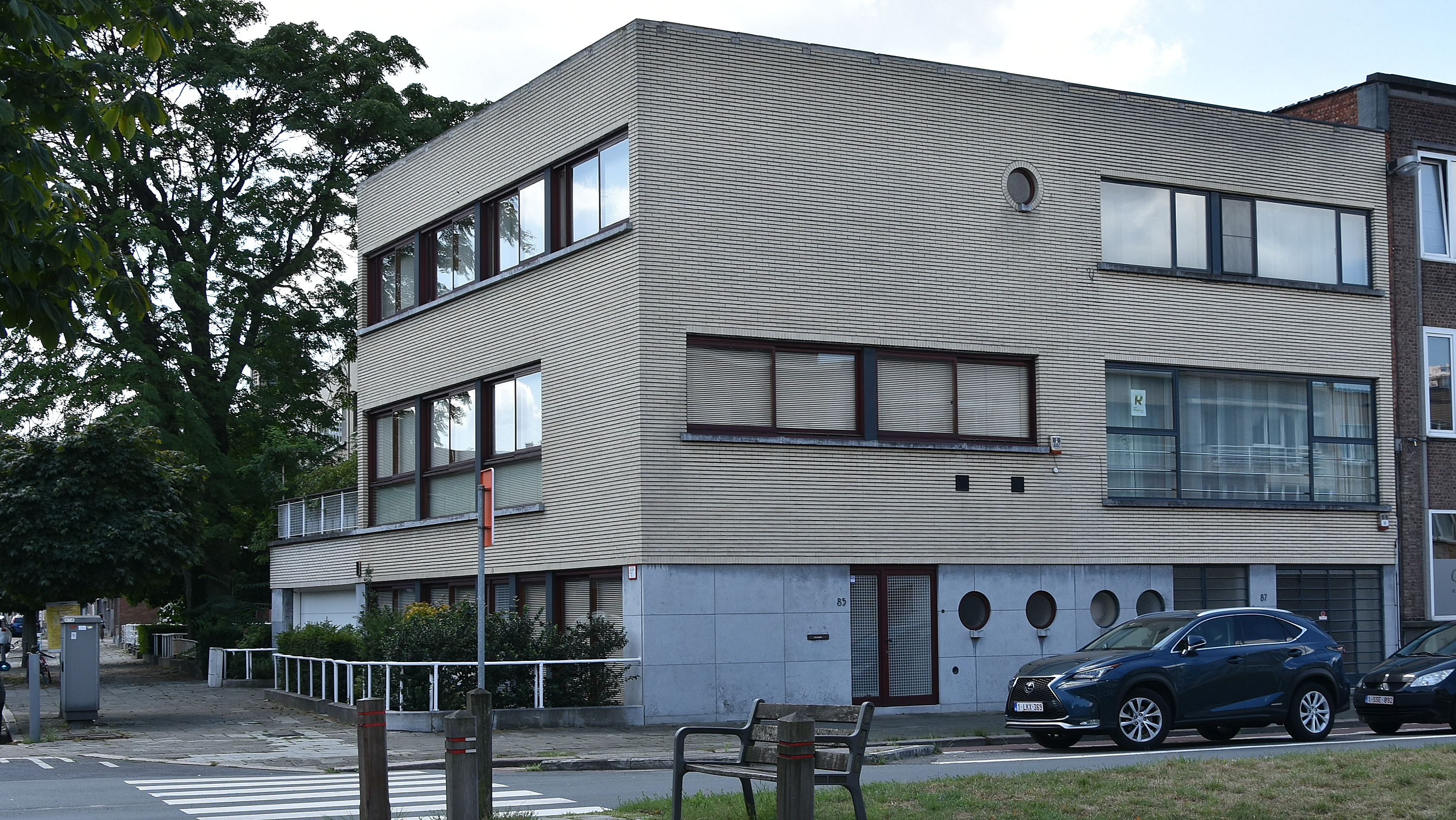 Léon Stynen architectenwoning Stynen en Verheyen Camille Huysmanslaan 85 Antwerpen (6597) 29-07-2019 12-52-55 This photo of immovable heritage has been taken in the Flemish Region